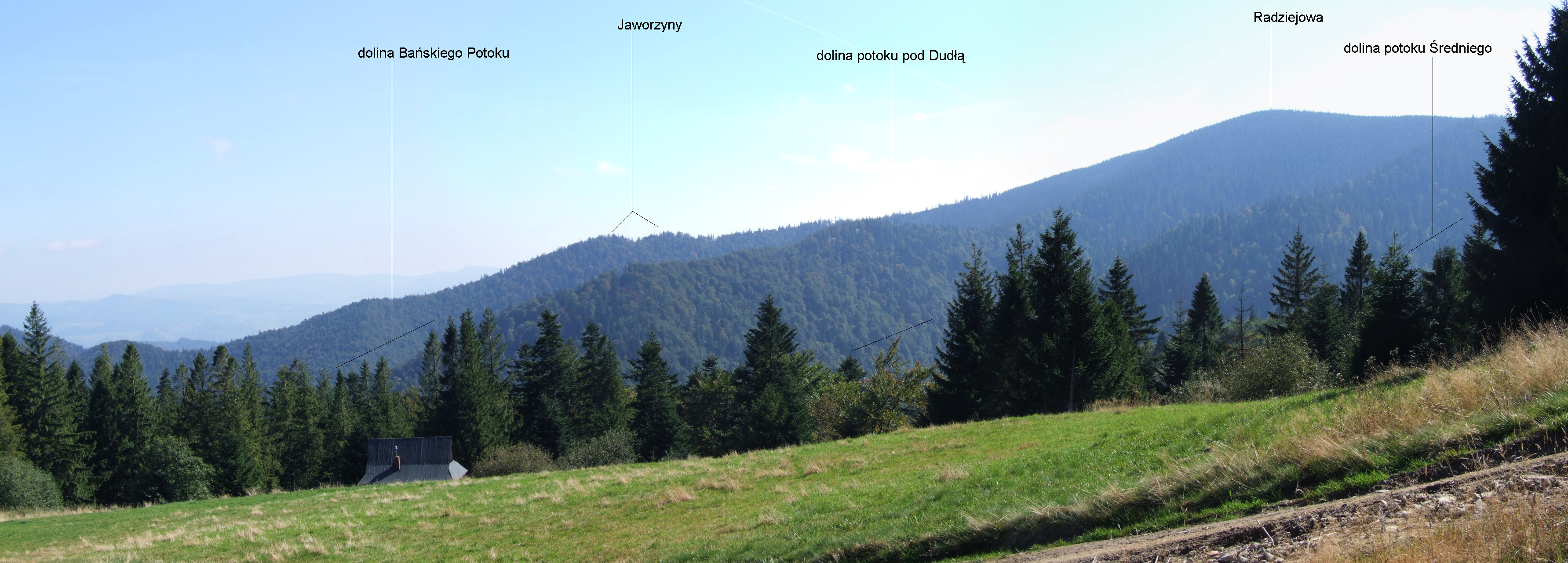 Hala Konieczna i widok na północne grzbiety Radziejowej